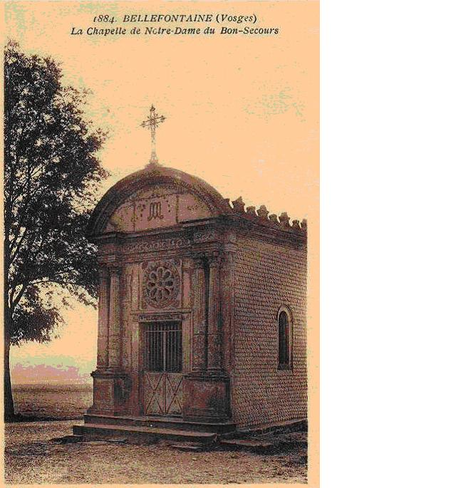 CPA Chappelle Notre-Dame du Bon-Secours